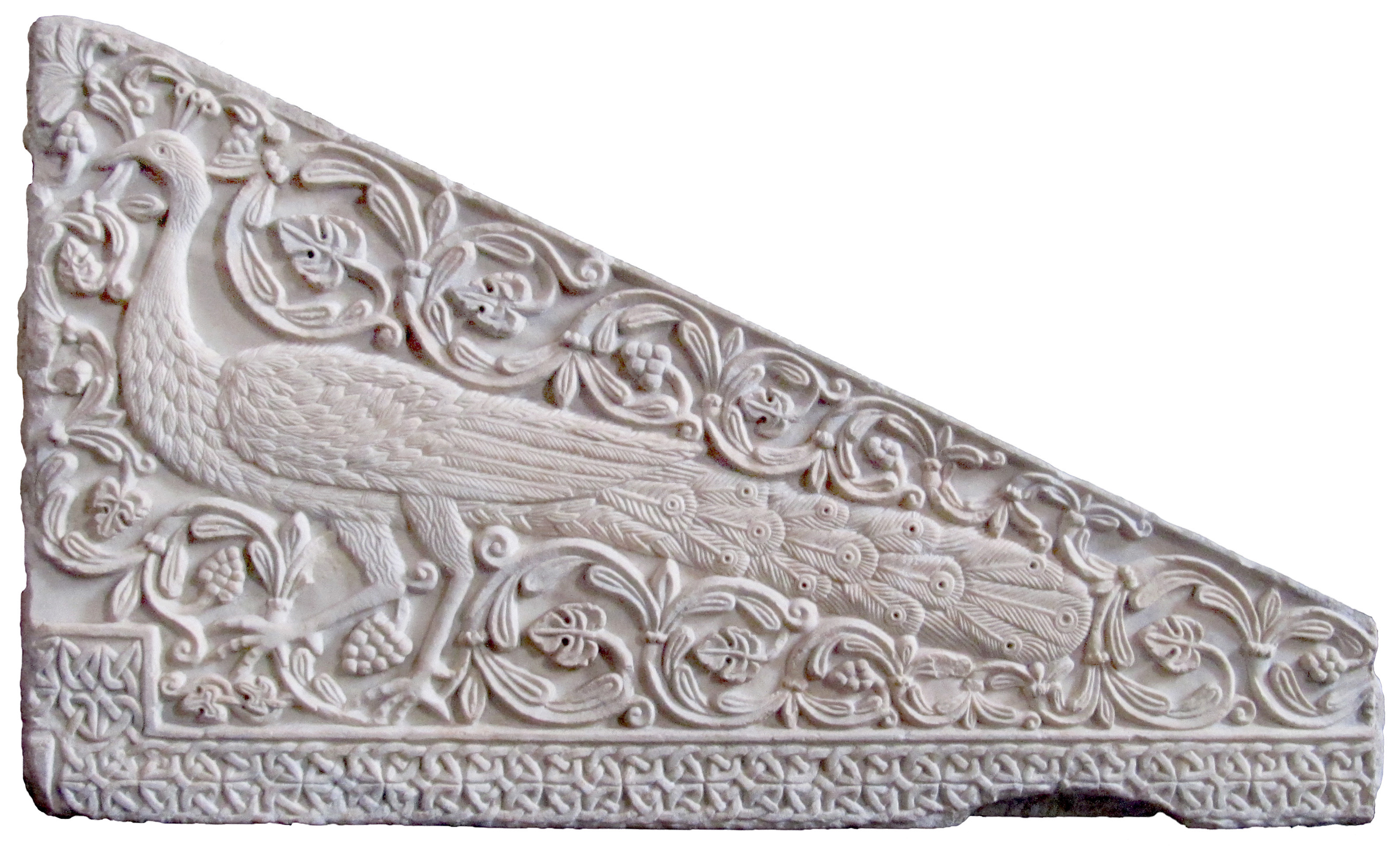 lastra con pavone, chiesa di san salvatore, brescia